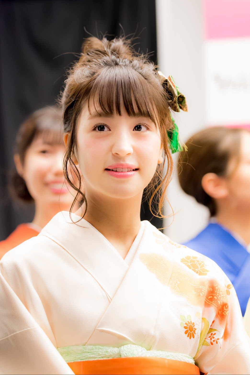 ２９１９年１月の田崎礼奈さん